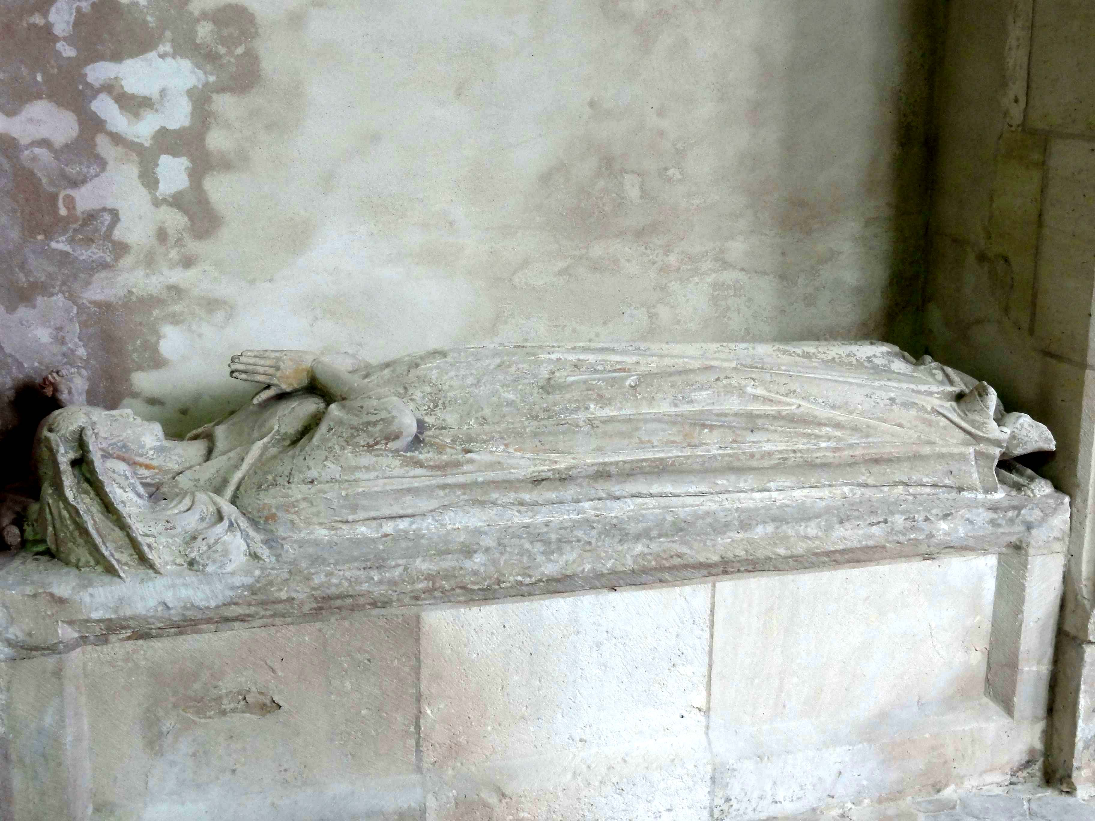 Mobilier de l'église (voir titre).